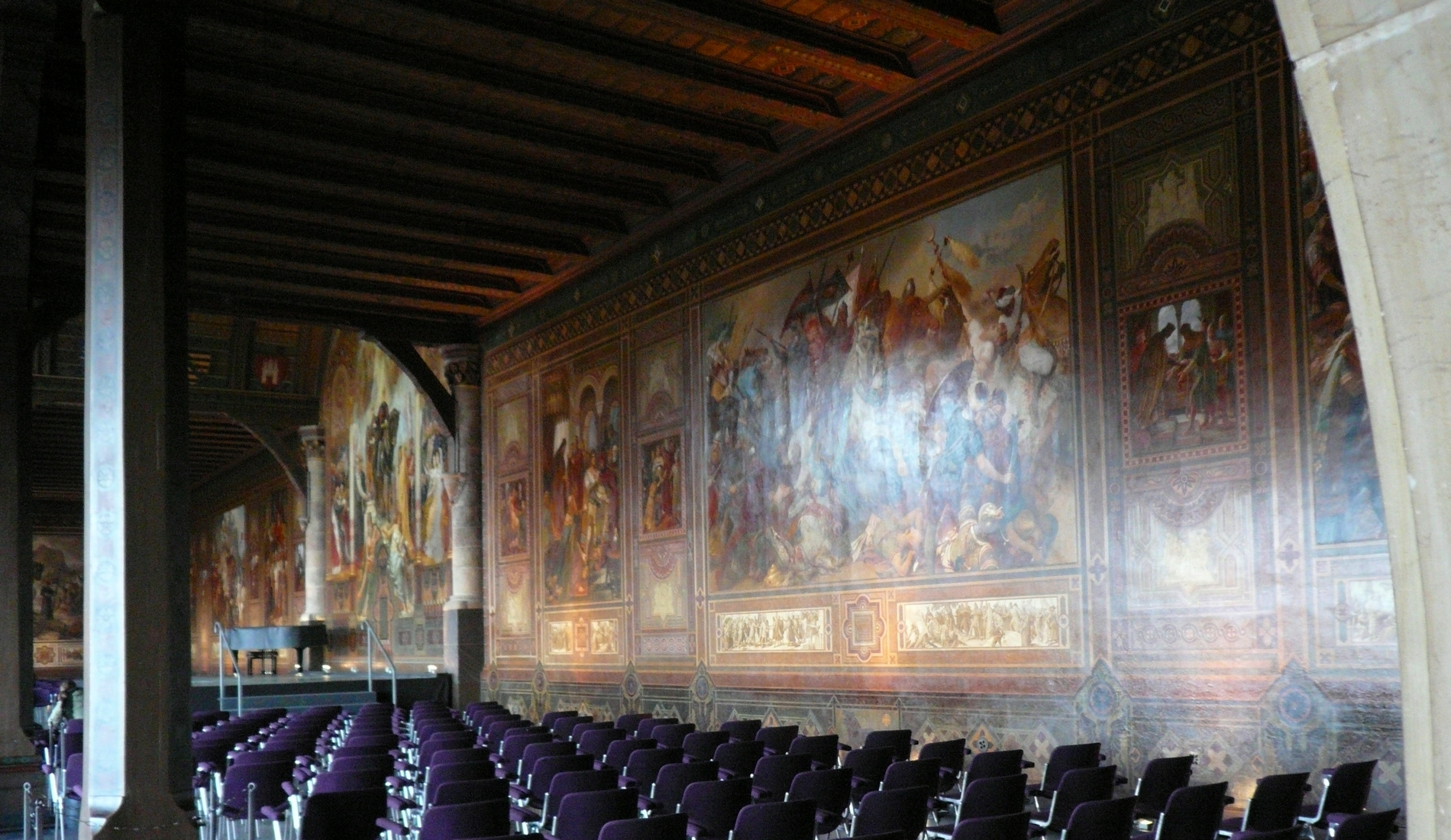 Kaisersaal Goslar, Innenaufnahme von Norden